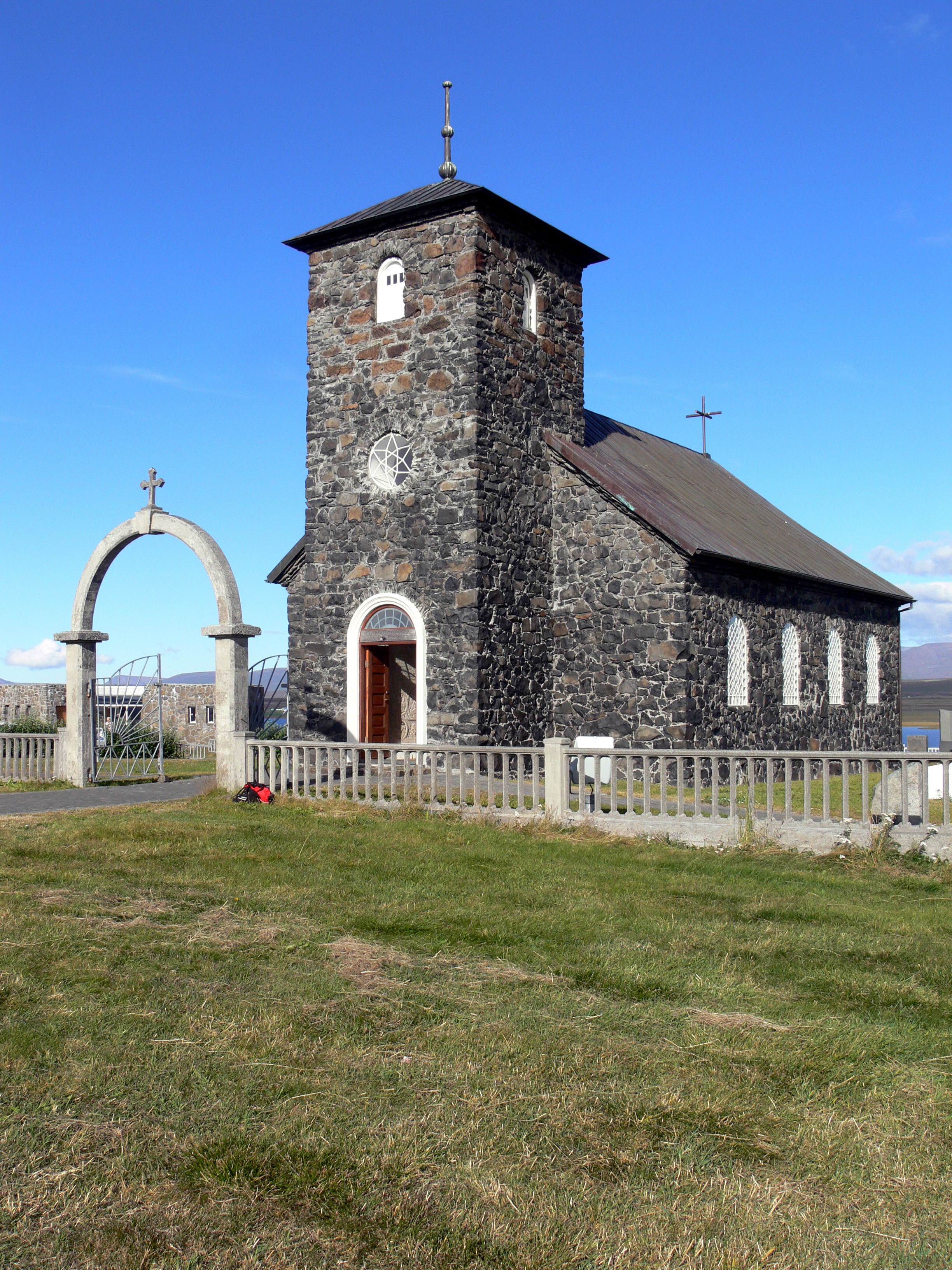 Kirche in Þingeyrar in Nordisland